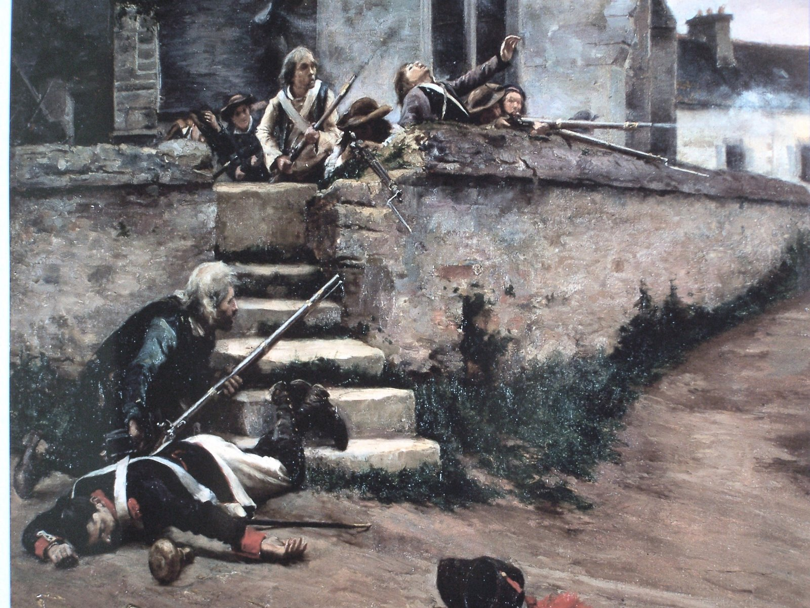 Episode de la guerre des Chouans